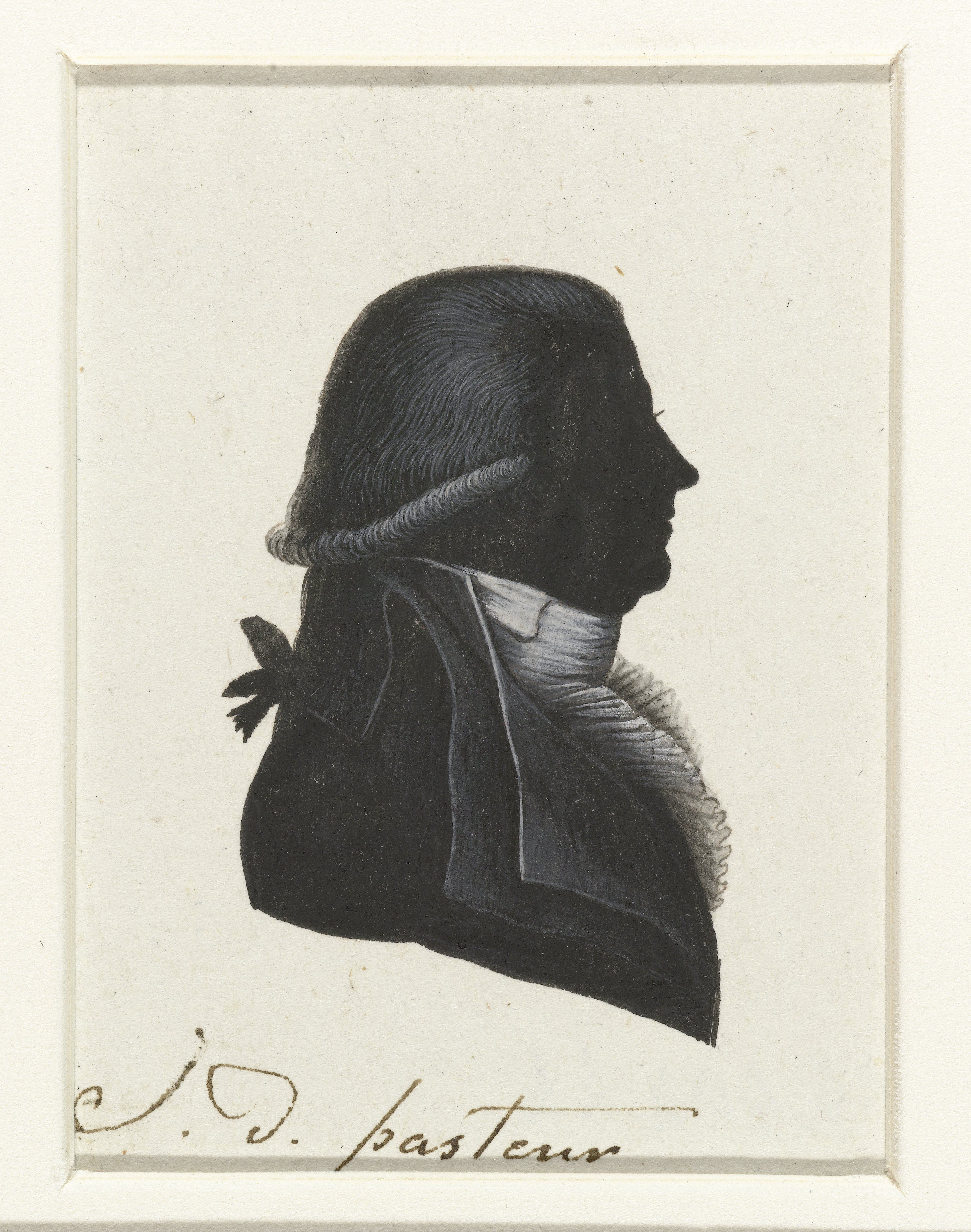 J.D. Pasteur. Tekening in Oost-Indische inkt, waarschijnlijk gemaakt door Hausdorff. De tekening behoort tot een serie van portretten van afgevaardigden naar de Eerste Nationale Vergadering in 1796-1797. Van de serie werden gravures gemaakt die zijn afgedrukt in "Geschiedenis der staatsregeling, voor het Bataafsche volk", een boek van Cornelius Rogge (1799).